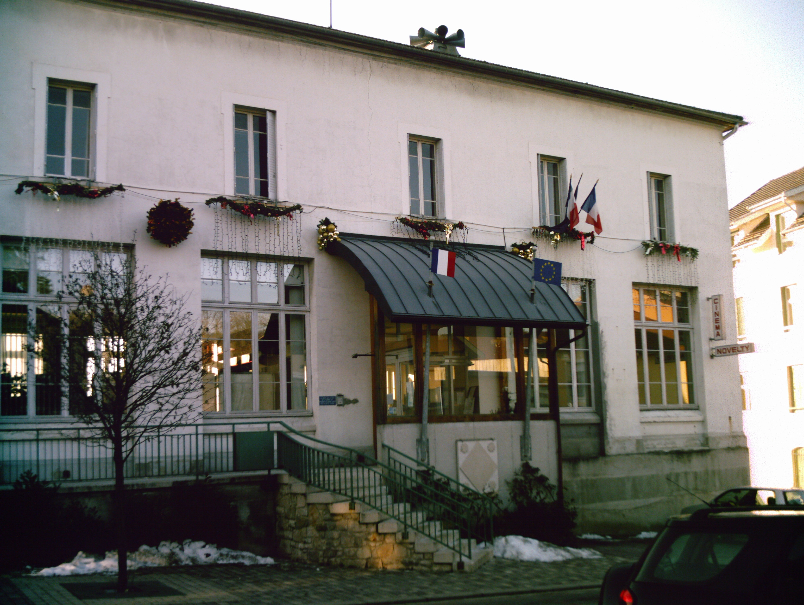 La mairie d'Hauteville-Lompnès